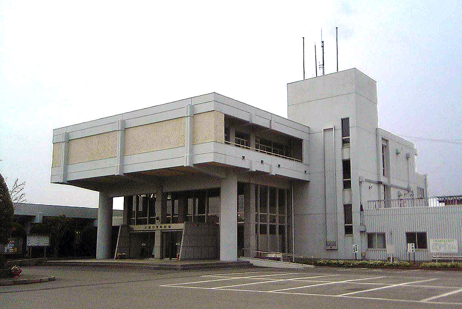 Ōamishirasato Town Hall, Ōamishirasato, Chiba, Japan